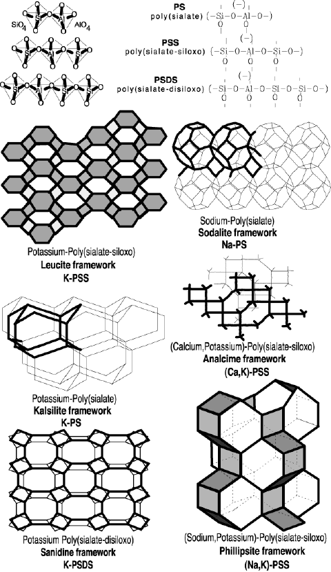 Exemples de molécules géopolymères, poly(sialate), poly(sialate-siloxo) poly(sialate-disiloxo) Institut Géopolymère, Catégorie:Image de chimie